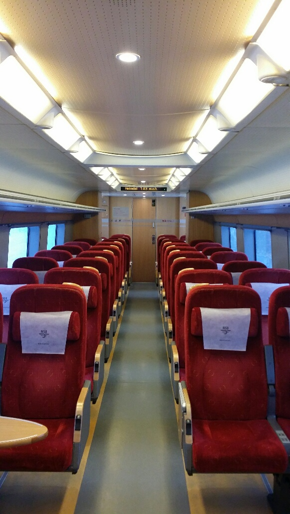 Interiør i BFM 73.142.